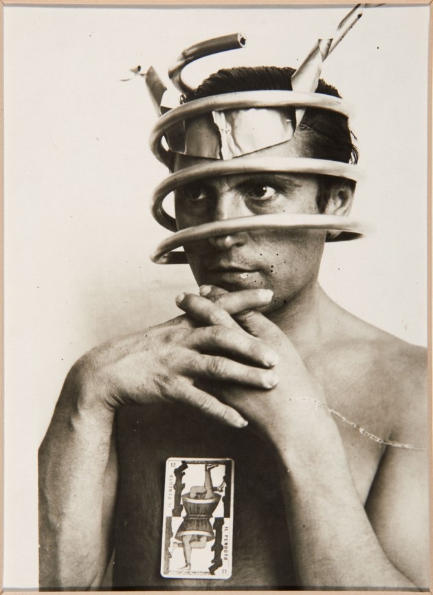 Gregorio Prieto Muñoz